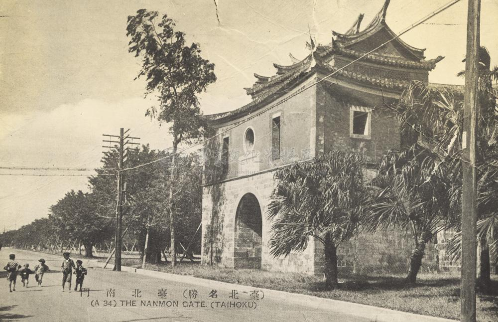 中文（台灣）: 改建前的臺北府城大南門，拍攝時間為日據時代。